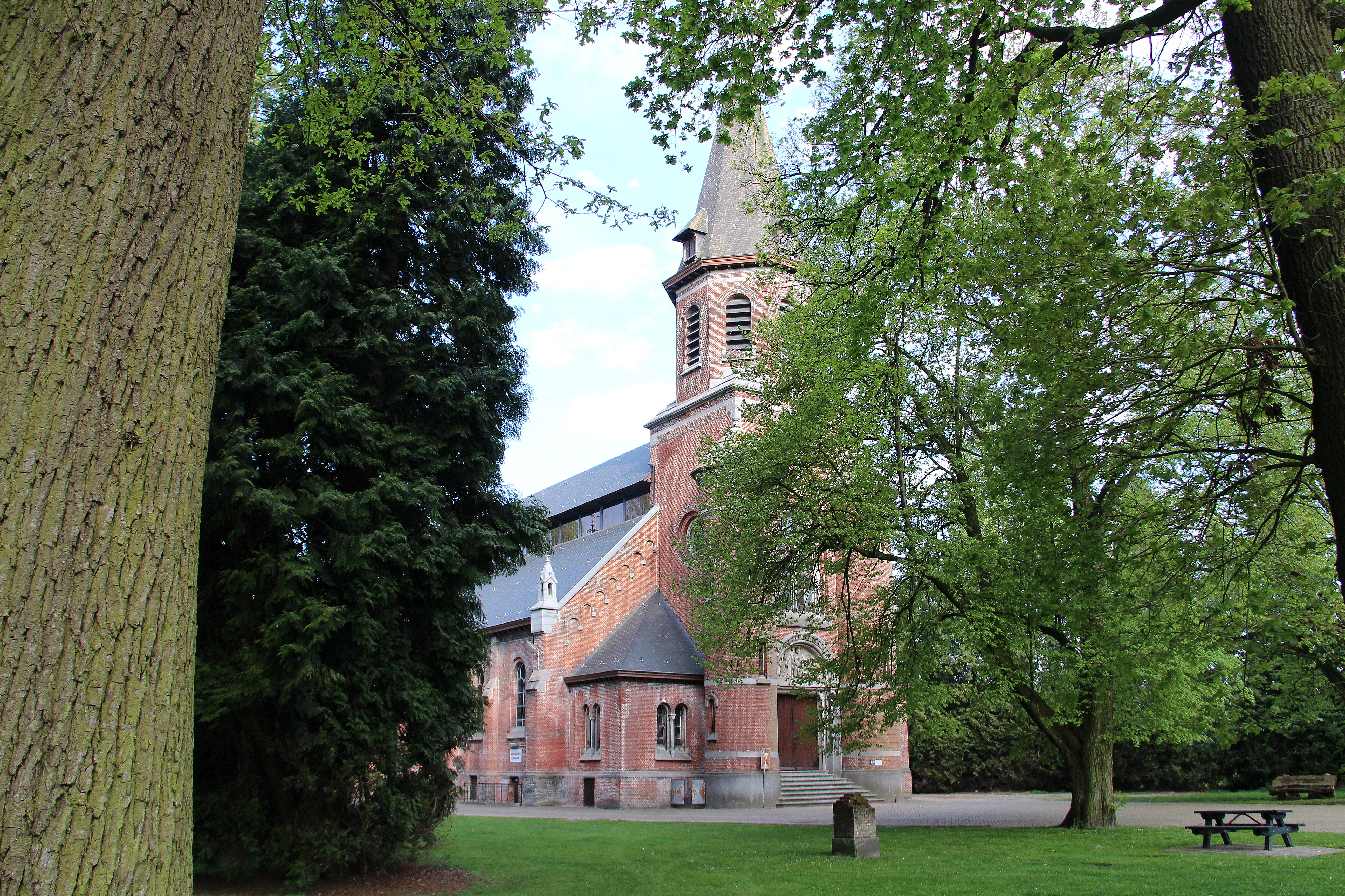 De voormalige gevangeniskapel,in 1897 gebouwd naar een ontwerp van architect Victor Besme, bevindt zich op de oost-west-aslijn doorheen de belangrijkste gebouwen van het domein: de kapel, het Centrum voor Illegalen, de strafinrichting en het gasthuis. De bakstenen kapel in eclectische bouwstijl is gericht naar het westen i.p.v. naar het oosten. De kapel is gewijd in 1899. De gehele kapel is onderkelderd en werd destijds gebruikt als voorraadruimte.